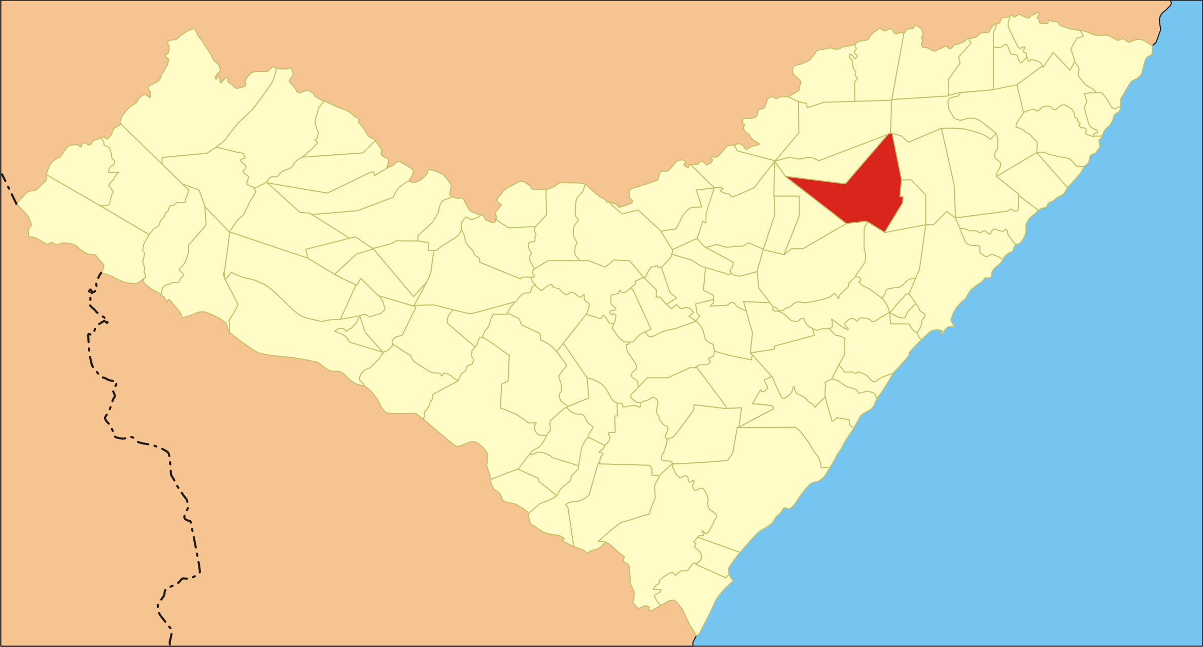 Localização da cidade no estado de Alagoas.